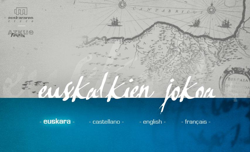 Euskalkien jokoa